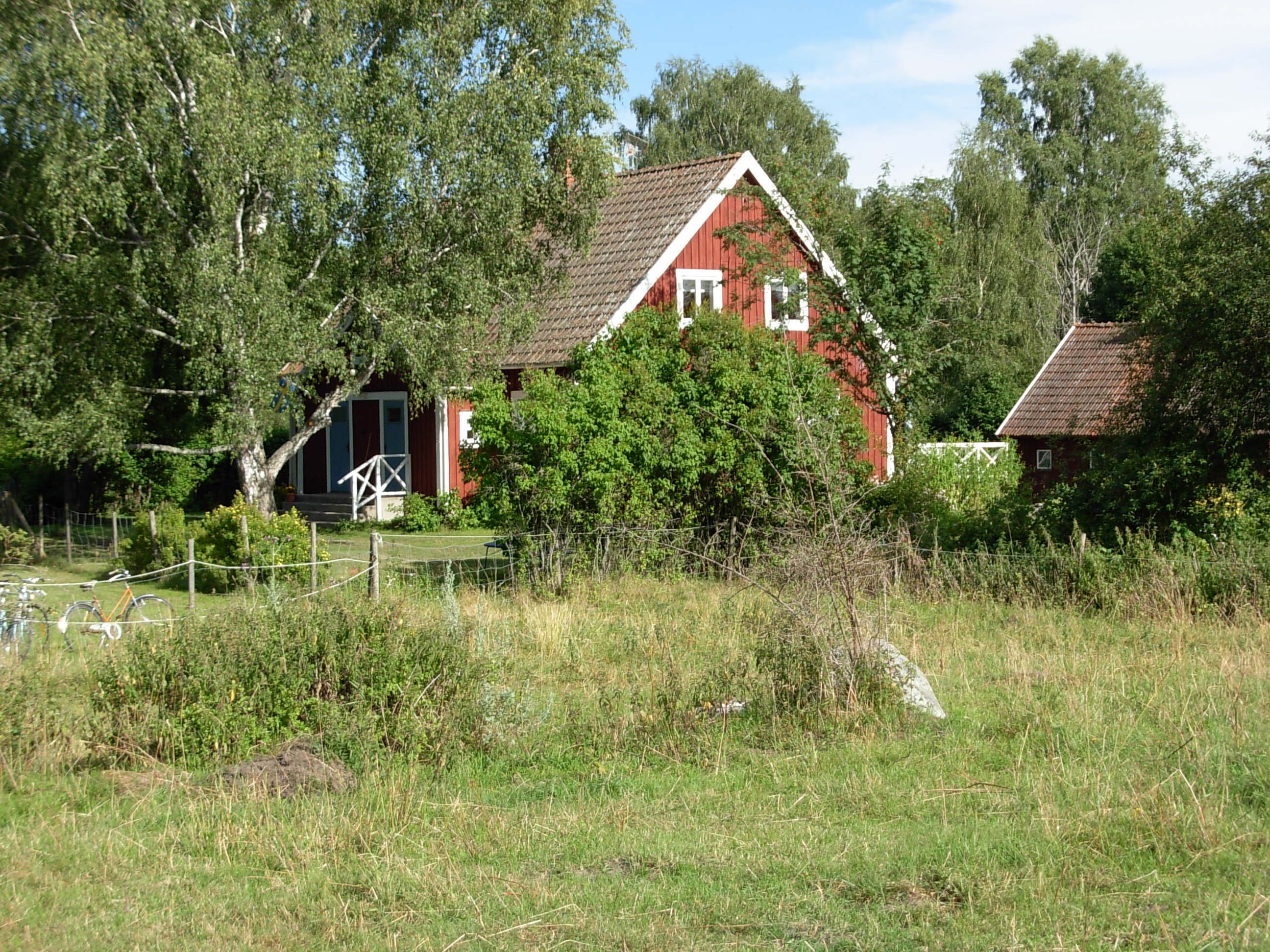 Ridön är en bebodd ö i den mellersta delen av Mälaren.